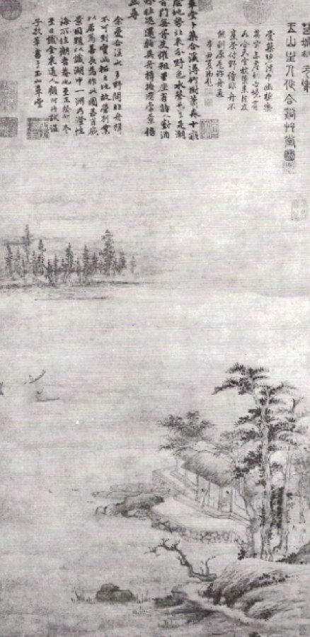 Pavillon à toit de chaume de Hexi par le peintre chinois du XIVe siècle Zhao Yuan. Rouleau mural en hauteur, encre et couleur claire sur papier daté 1363. Ses dimensions en centimètres sont: 84,3x40,8. Il est conservé au Musée de Shanghai.